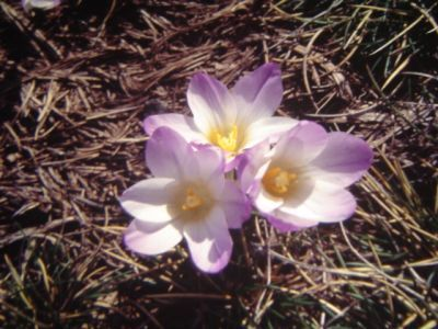 Crocus carpetanus, foto tomada en Sierra de Gredos, Ávila, España